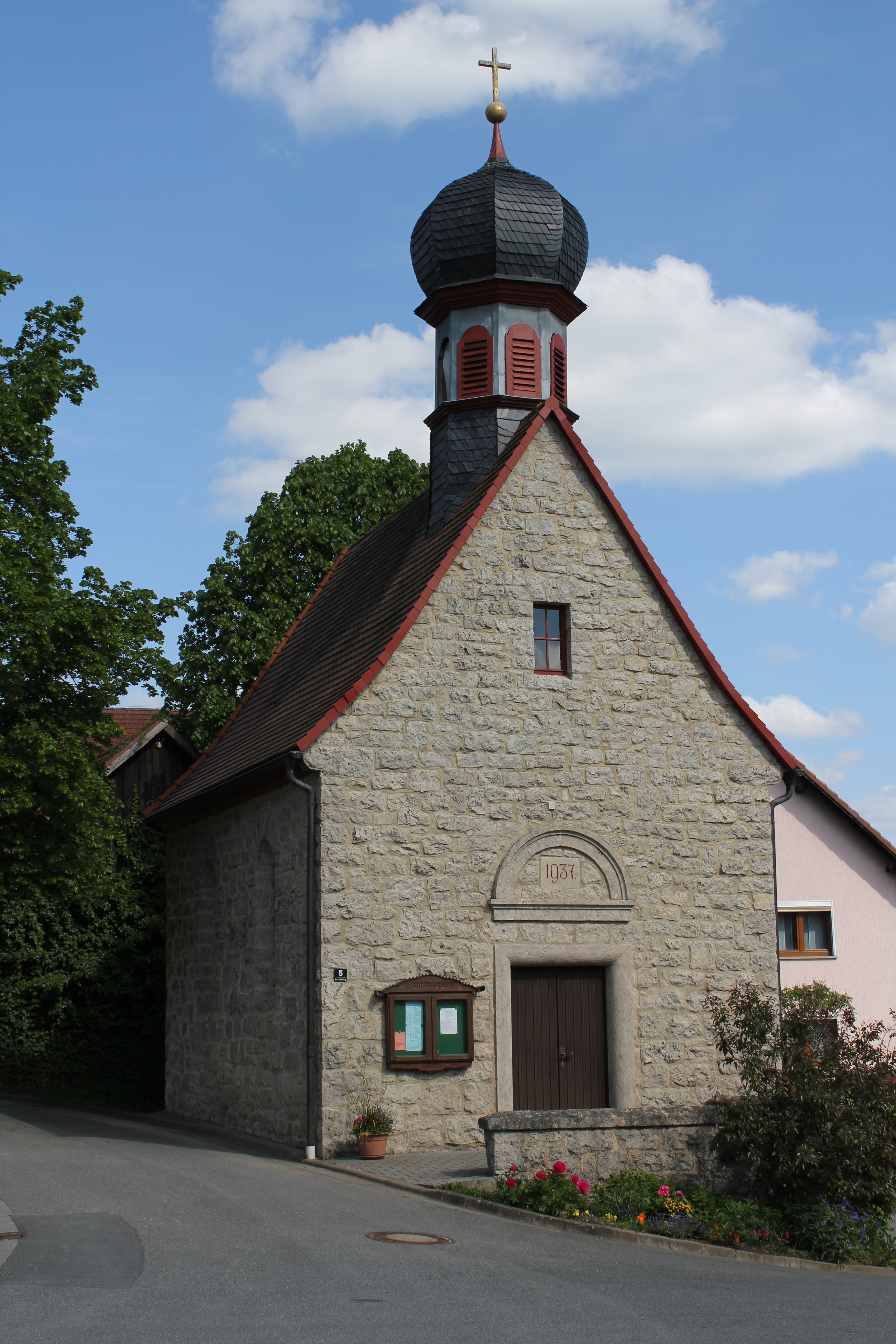 Die Kapelle im Ortskern von Köttel